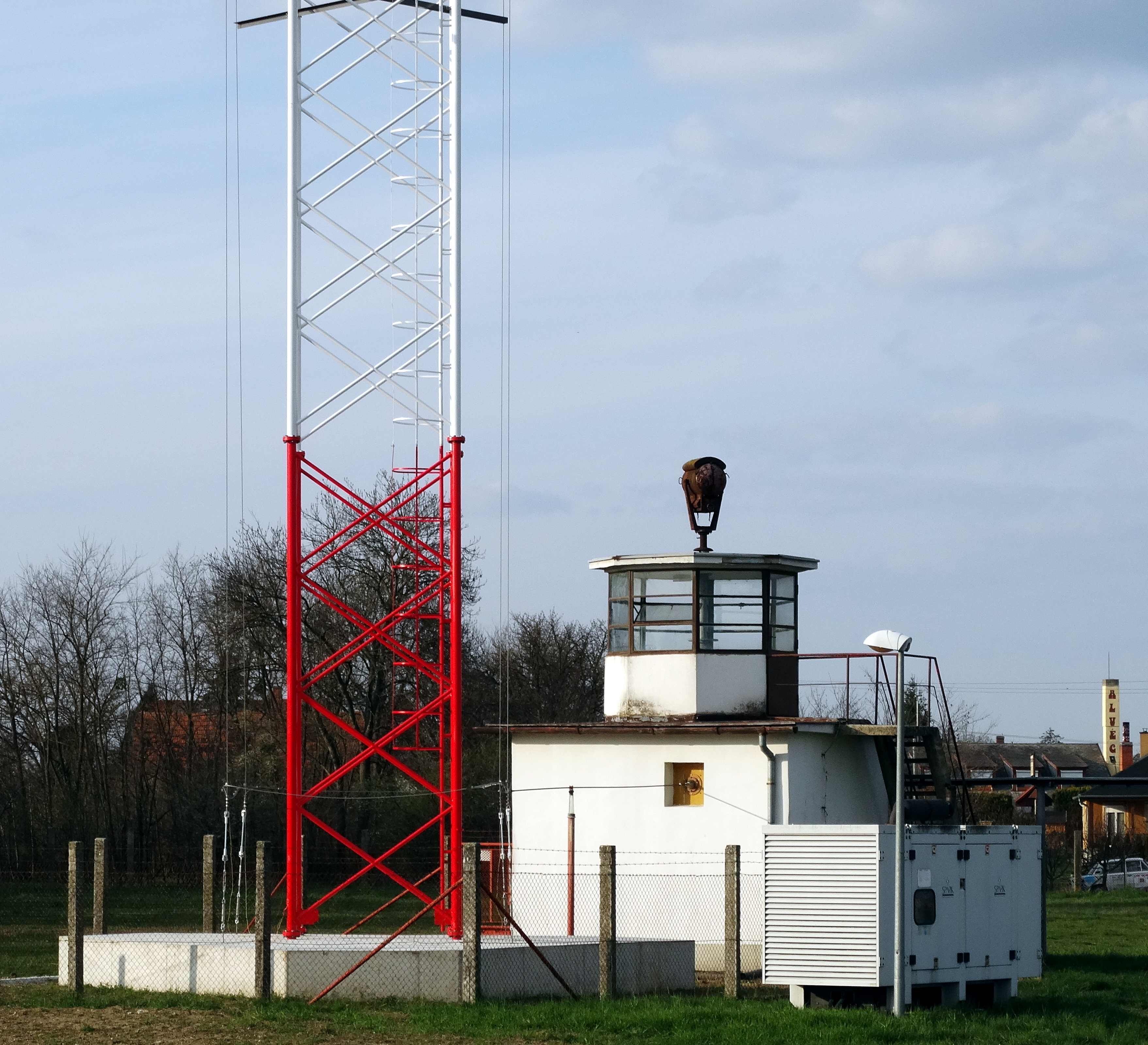 Mittelwellensender Szombathely in Ungarn: Fusspunkt des nicht gegen Erde isolierten und mittig über aussen geführte Drahtseile angespeisten selbststrahlenden Sendemasten. Rechts dahinter das Antennenhaus mit den Einrichtungen zur Ankopplung der Sendeendstufe an die Antenne.